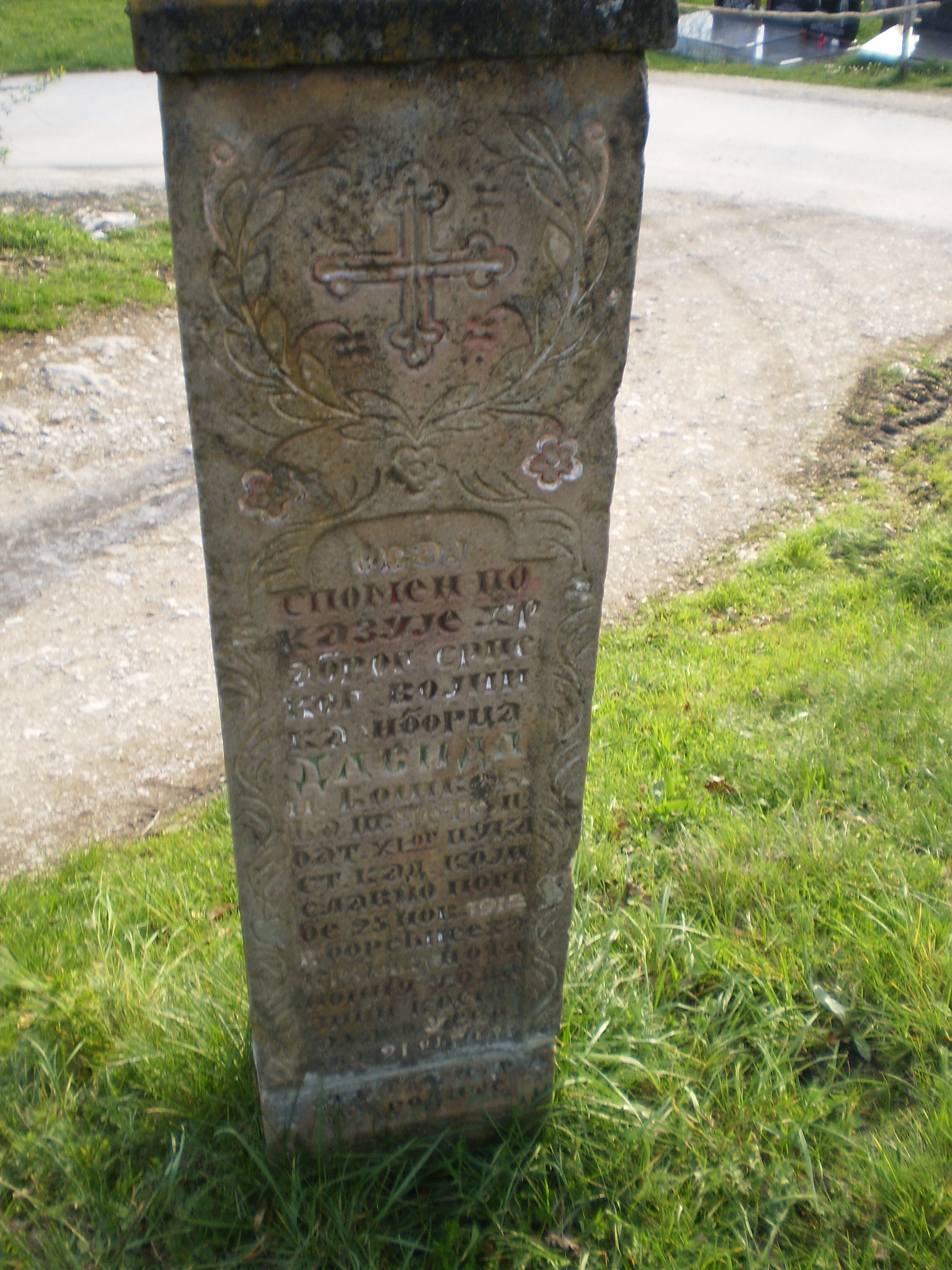 Српски (ћирилица): Споменик (Крајпуташ) Давиду Бошковићу, 1914. Селиште